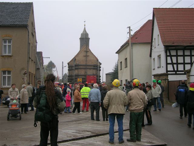 Überführung der Emmauskirche von Heuersdorf nach Borna